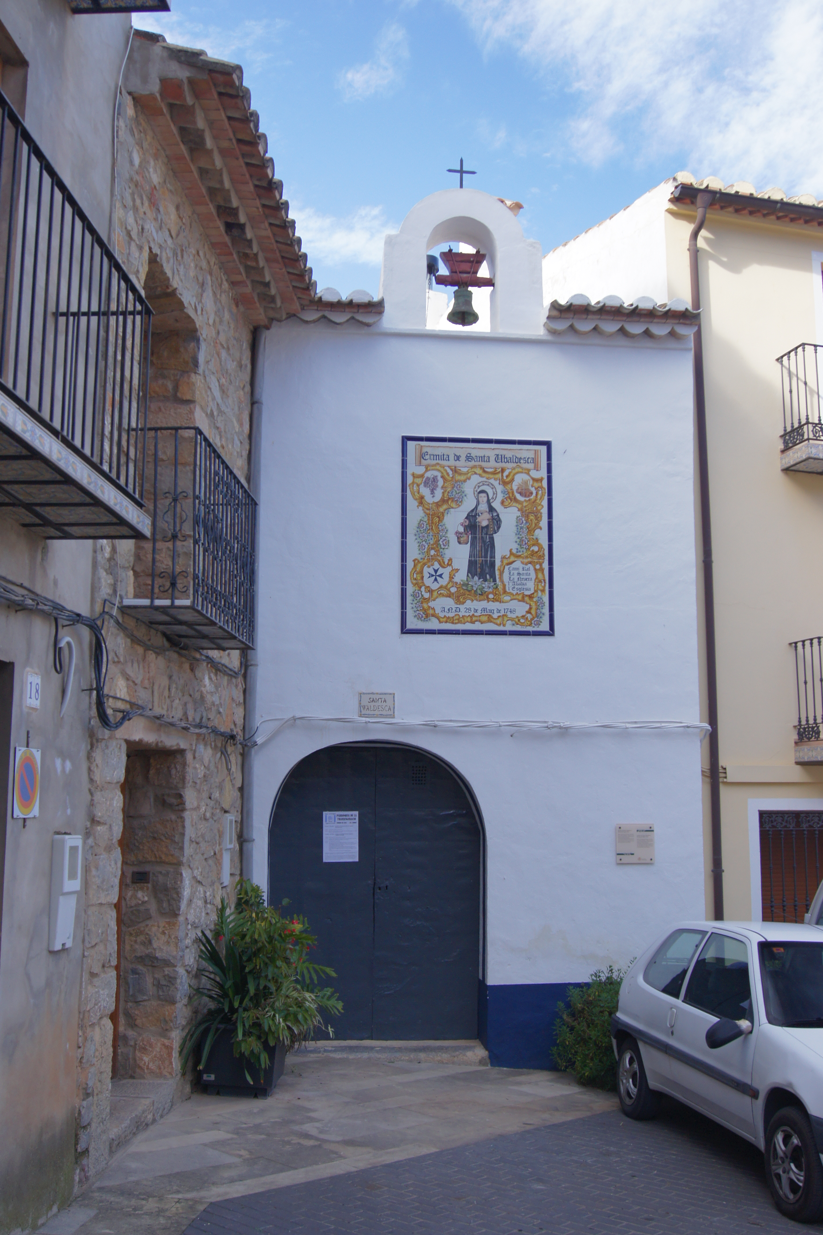 Ermita de Santa Ubaldesca o Waldesca. Les Useres. Castellón. España